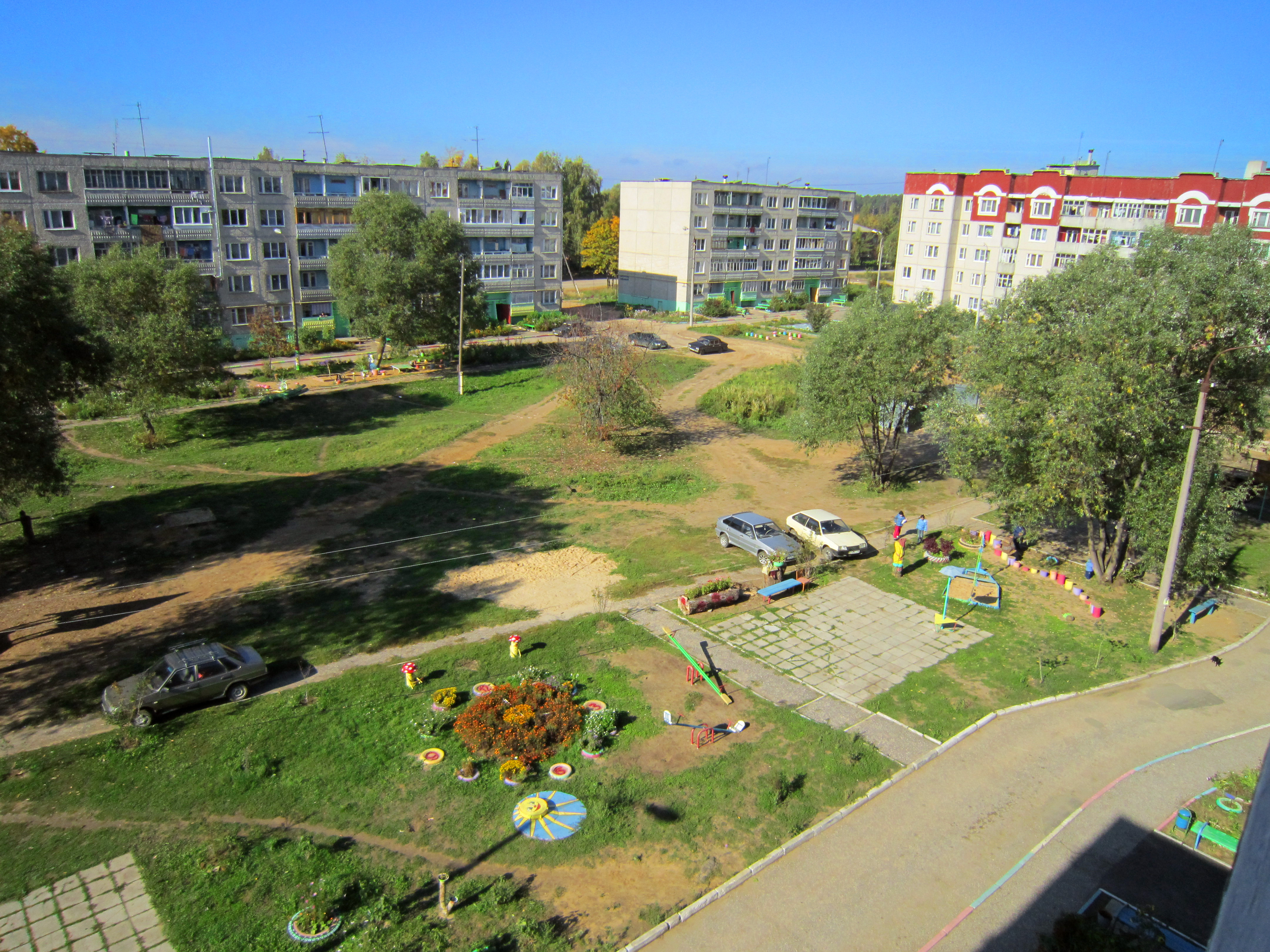 Kameshkovo, Vladimir Oblast, Russia